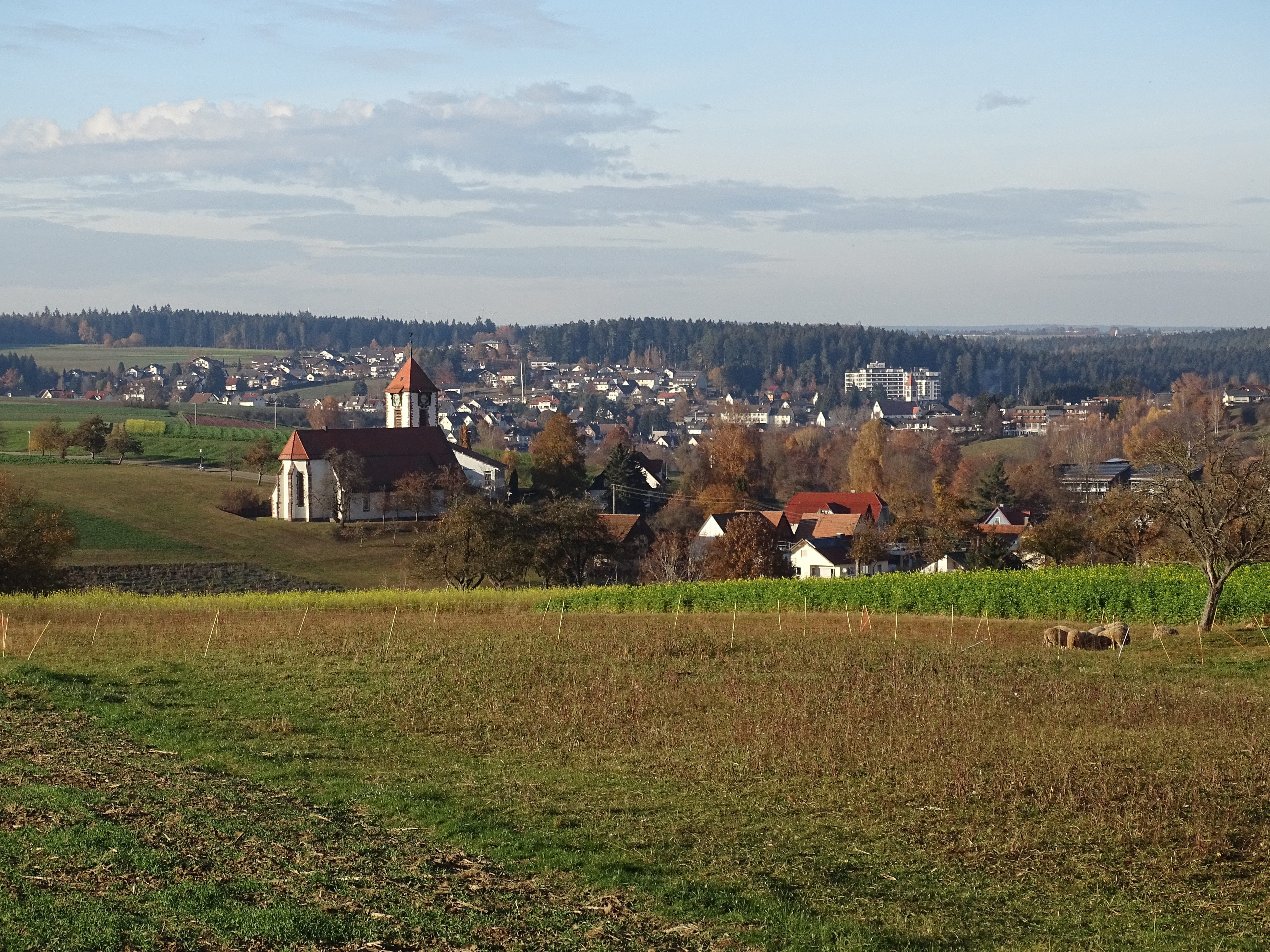 Ansicht von Tumlingen